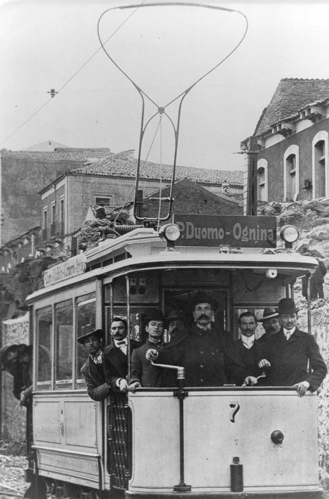 Tram di Catania, n° 7, linea 3 Duomo - Ognina, al deposito di via Domenico Tempio (i palazzi che si vedono in fondo sono in via Stella Polare), inverno 1907